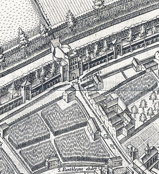 Ausschnitt des Mercator – Stadtplanes Köln. Bereich „Weidenbach/Bachpforte“